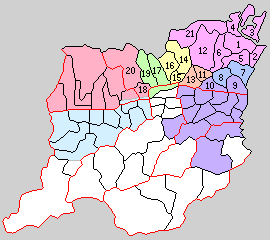 徳島県板野郡の町村制時点の町村。